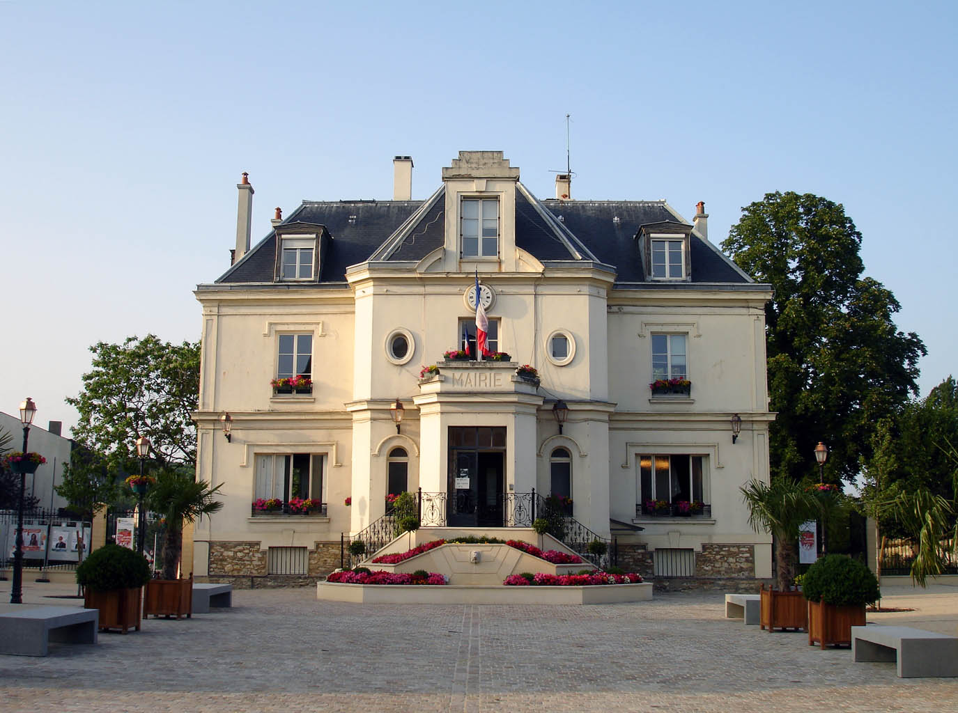 L'Hôtel de ville de Groslay (Val-d'Oise), France